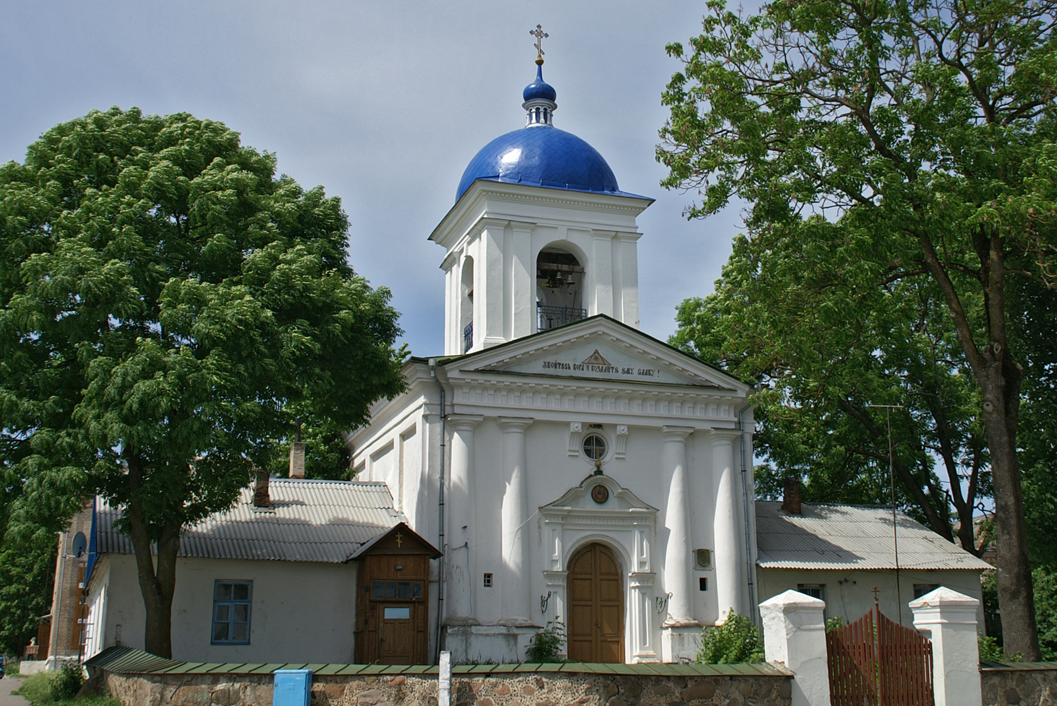 Беларуская (тарашкевіца): Ансамбаль Сьвята-Усьпенскага манастыра:Усьпенскі сабордэкаратыўнае аздабленьне:росьпіс у консе «Спас Пантакратар», арнамэнтальны дэкор на скляпеньнях паўднёвай сакрысьціі і ўсіх нэфаў, іканастас, бакавыя алтарыБогаяўленская царкваКрыжаўзьвіжанская царквазваніцабудынак сэмінарыіжылы корпусгаспадарчыя пабудовы. в. Жыровічы This is a photo of Belarusian heritage monument. Reference number: 411Г000537 ( WLM)